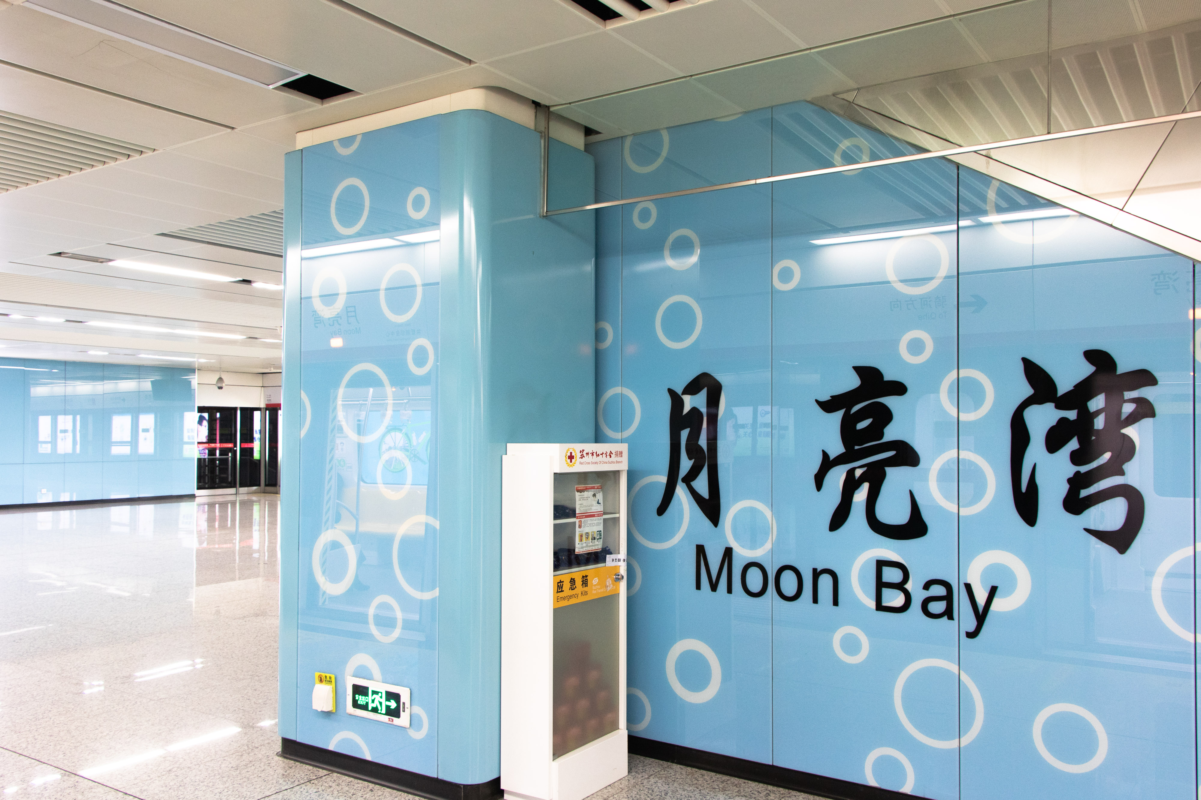 中文（中国大陆）: 月亮湾站站名壁